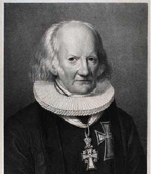 Litografi